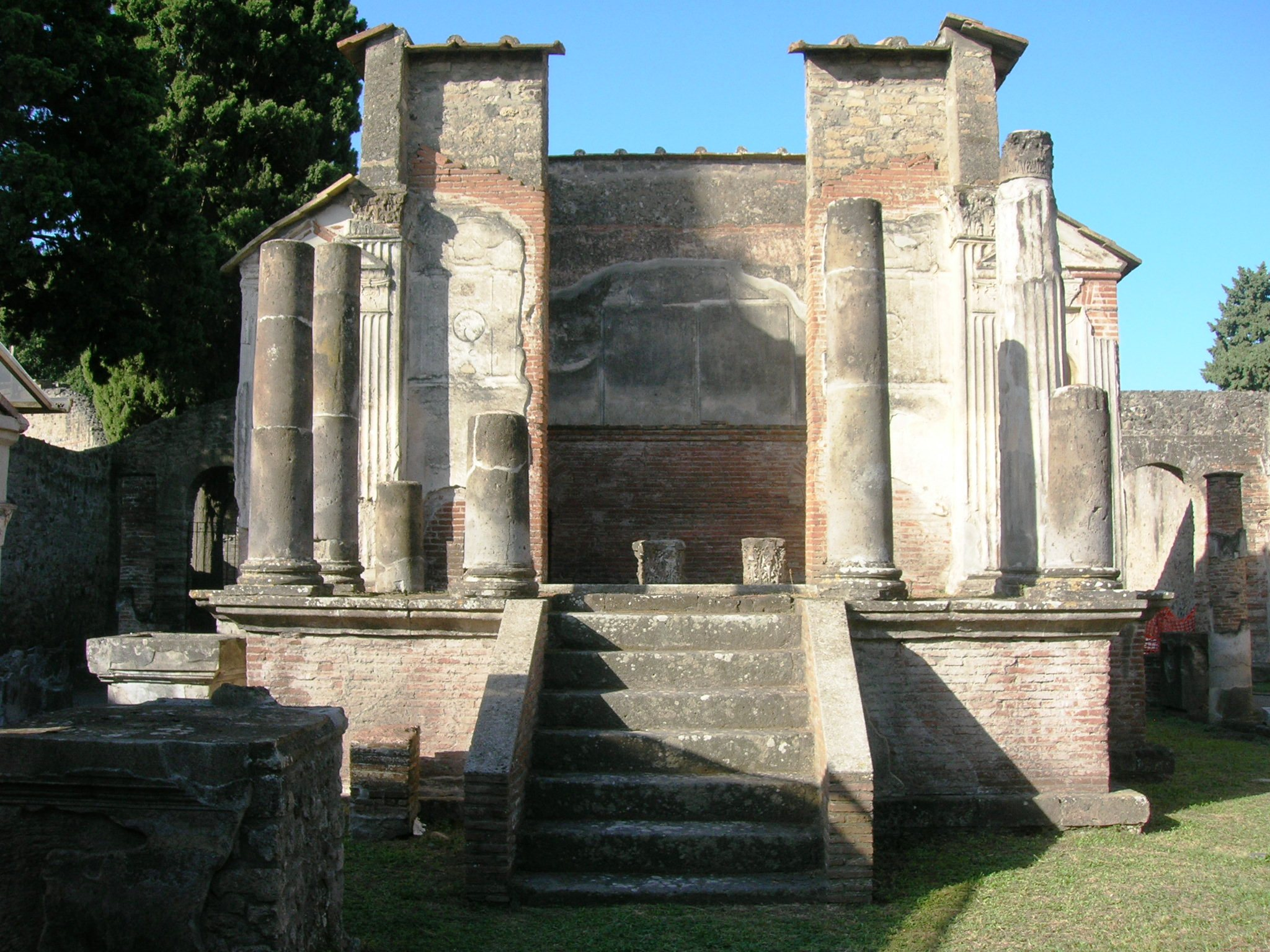 Tempio di Iside